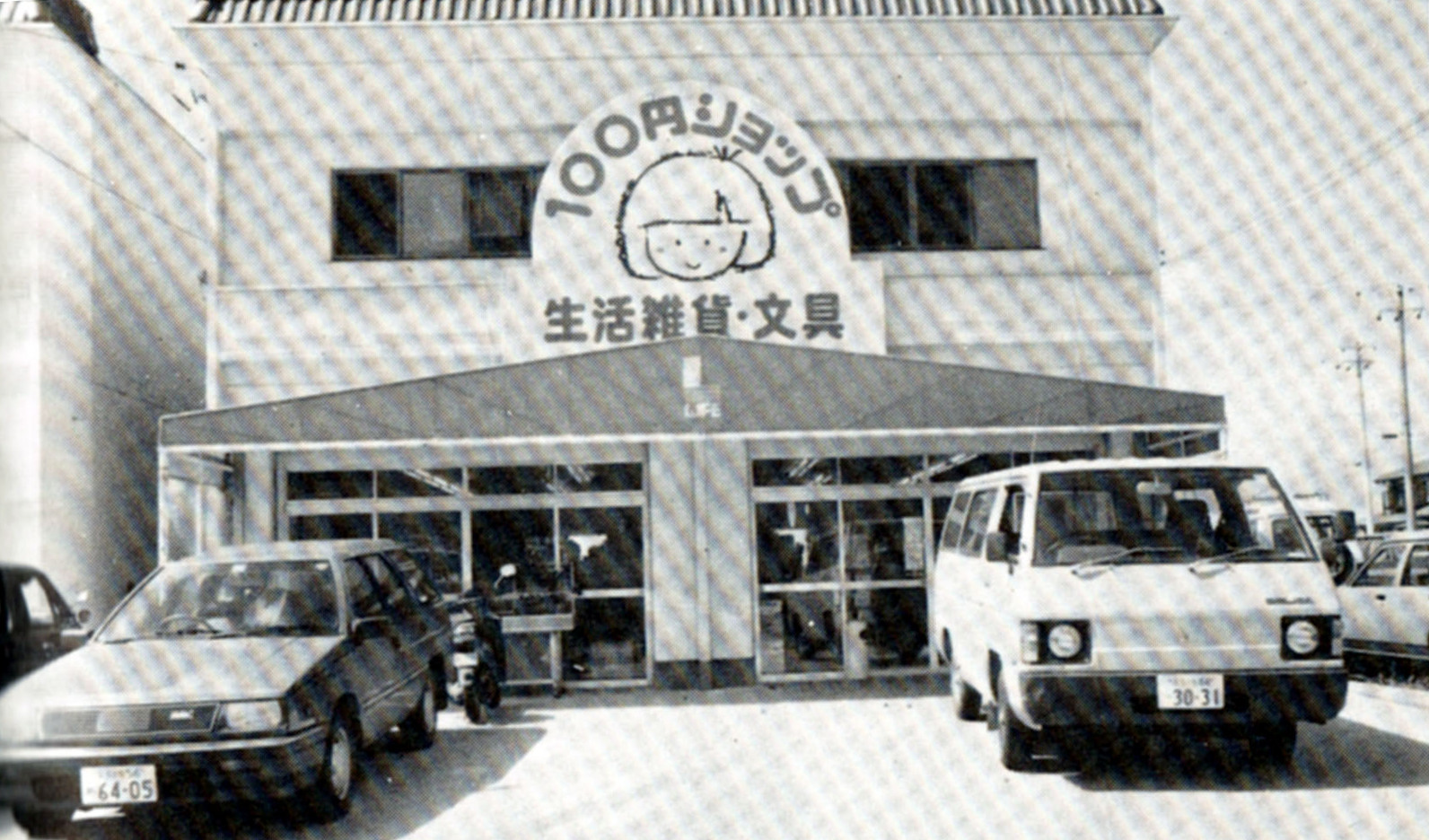 日本初の100円均一の店 100円ショップ春日井店1985年オープン